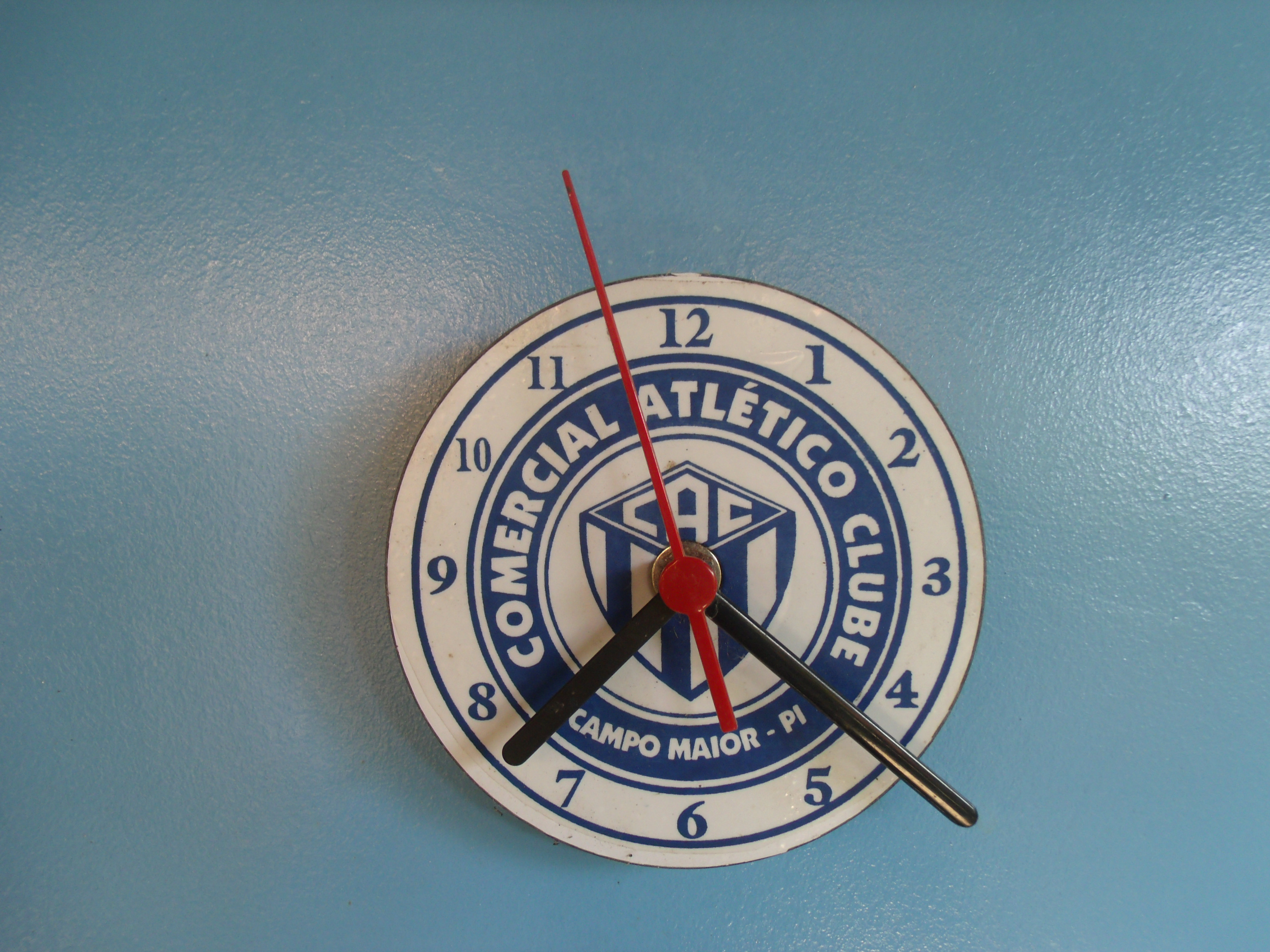 Relógio artesanal com de torcedores do Comercial Atlético Clube de Campo Maior, no Piauí.